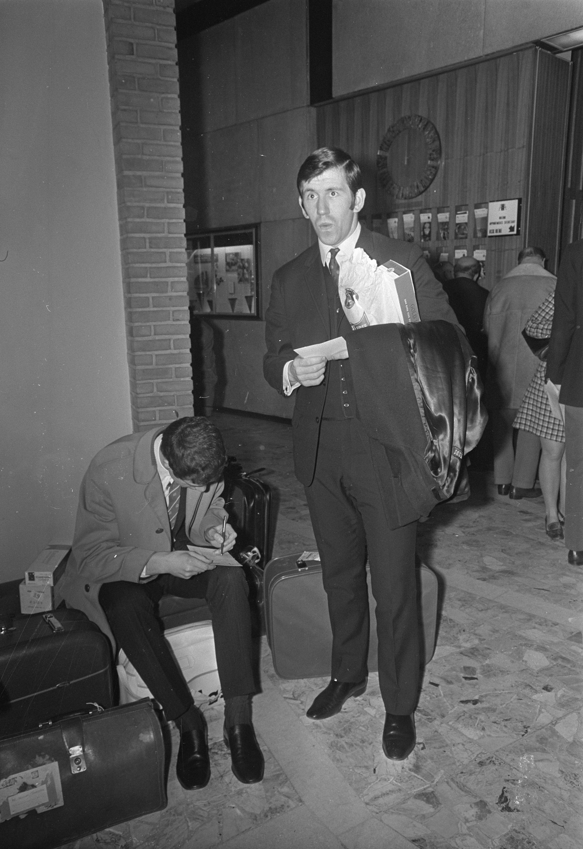 Collectie / Archief : Fotocollectie Anefo Reportage / Serie : [ onbekend ] Beschrijving : Glasgow Rangers in Hiltonhotel te Amsterdam. John Greig Datum : 14 januari 1969 Locatie : Amsterdam Trefwoorden : voetballers Persoonsnaam : Greig, John Instellingsnaam : Hiltonhotel Fotograaf : Nijs, Jac. de / Anefo Auteursrechthebbende : Nationaal Archief Materiaalsoort : Negatief (zwart/wit) Nummer archiefinventaris : bekijk toegang 2.24.01.05 Bestanddeelnummer : 922-0132